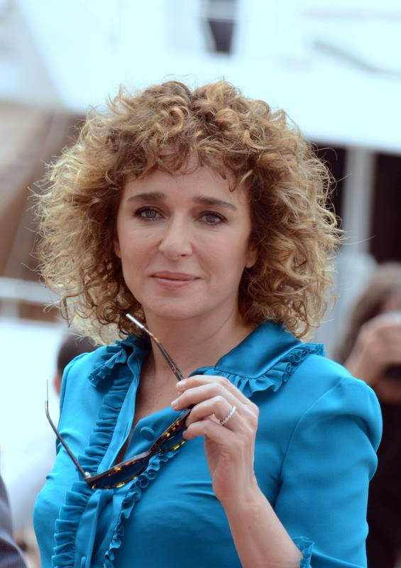 Valeria Golino au festival de Cannes